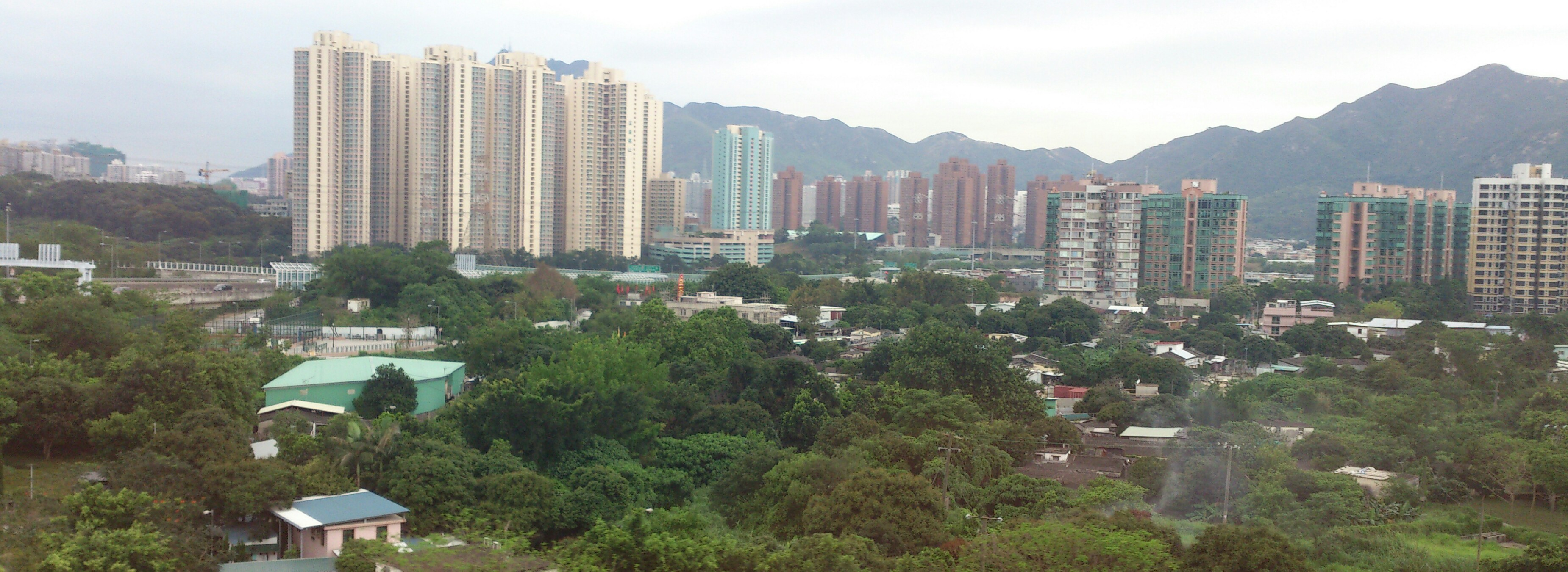 藍地